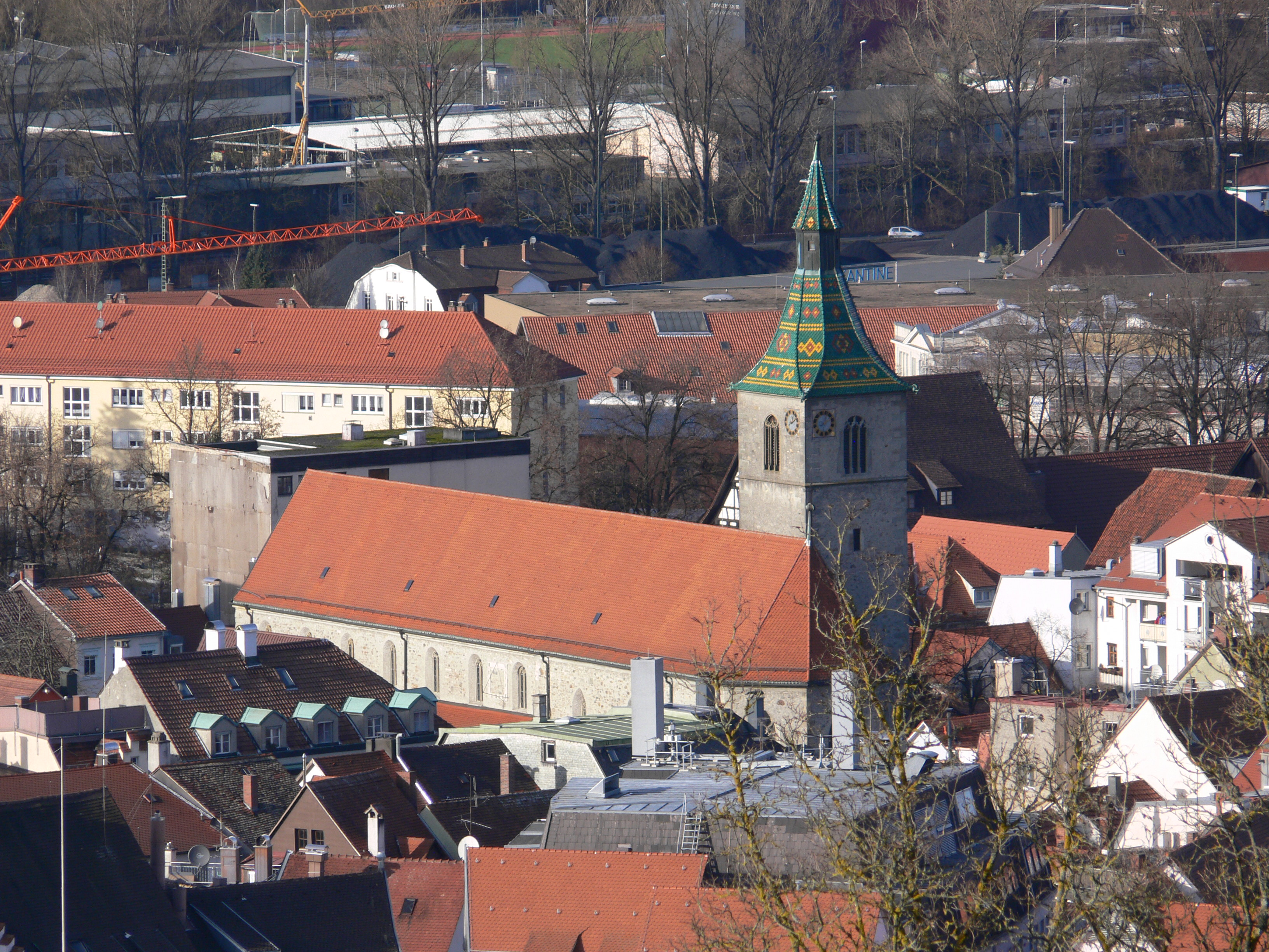 Ravensburg, Blick von der Veitsburg auf die Jodokskirche